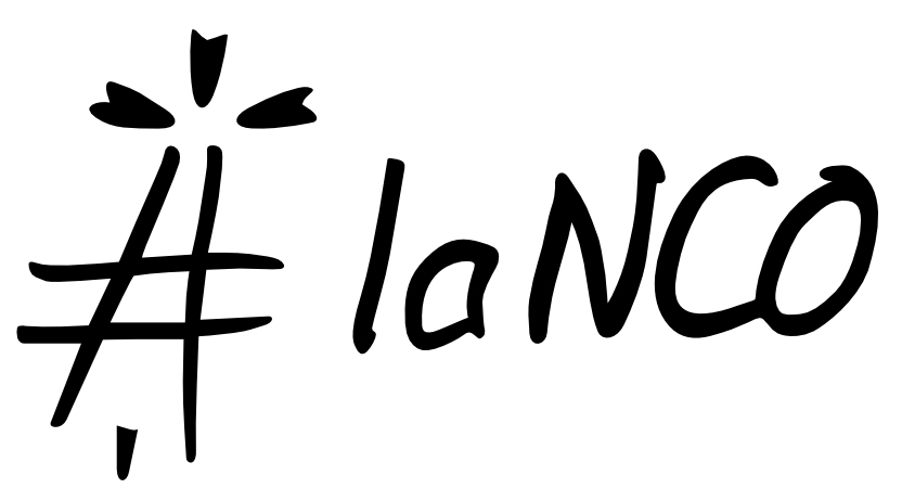 Logo de la NCO, groupe de wikimédiens habitant Rennes et l'ouest de la France